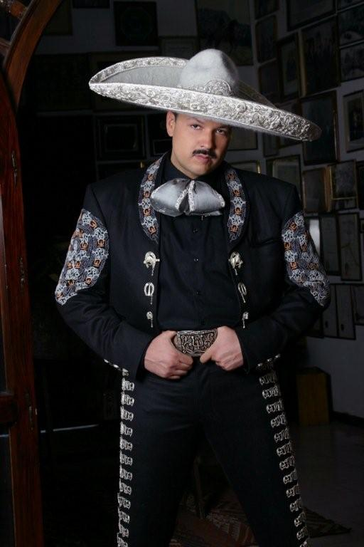 Pepe Aguilar De Charro